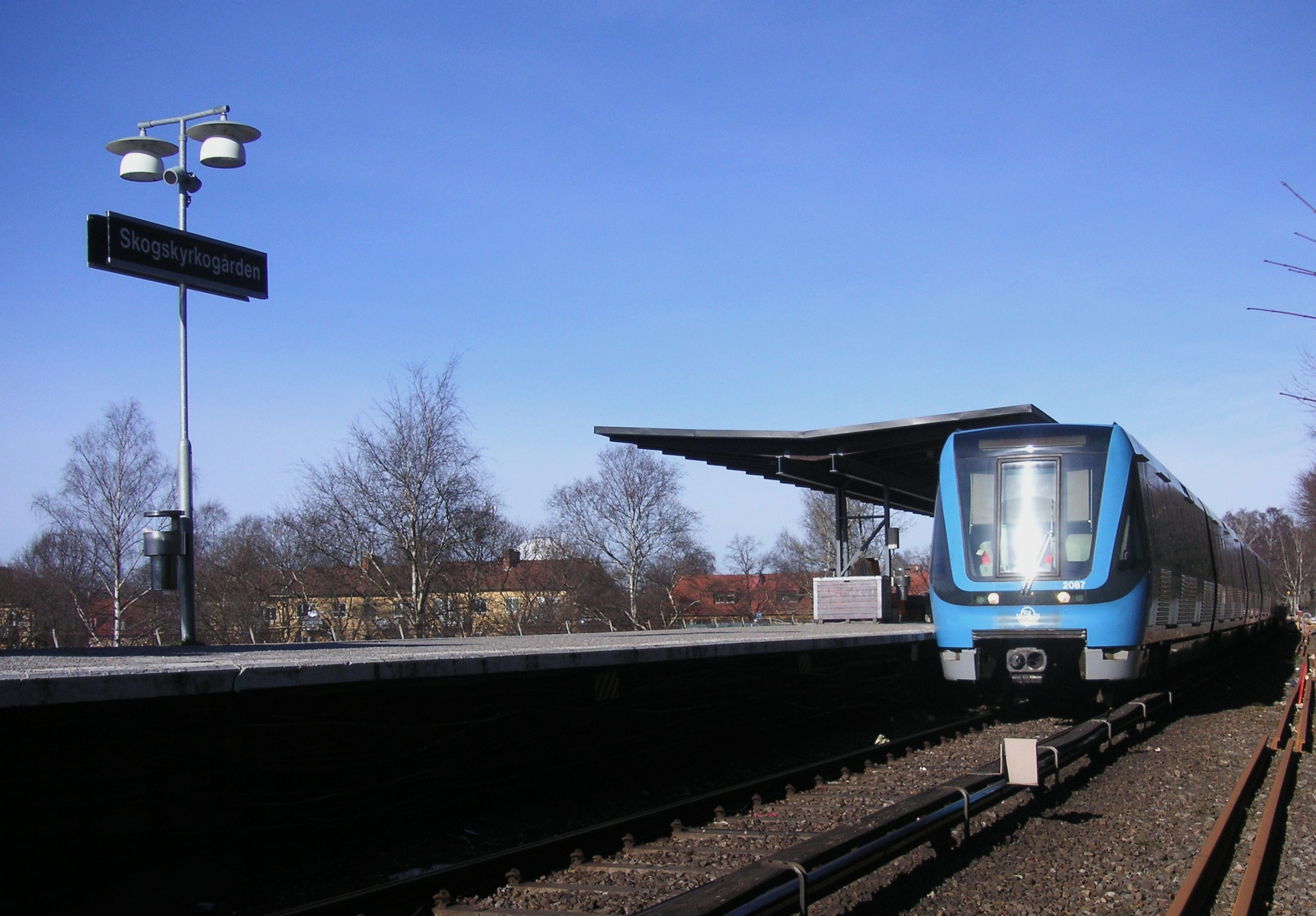 Skogskyrkogårdens T-banestation, Stockholm